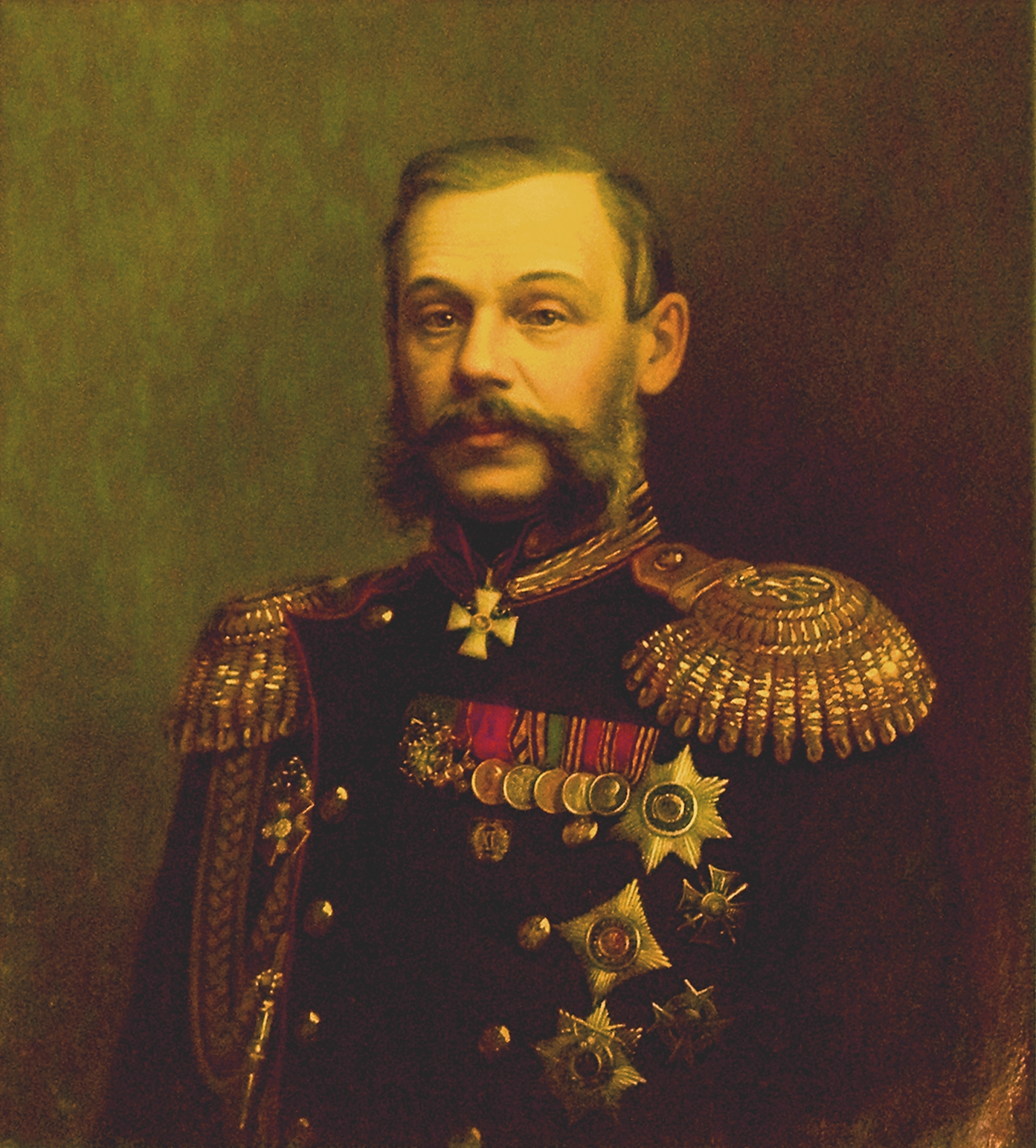 Милютин,Дмитрий Алексеевич. Генерал-Адъютант. Военный министр (1861-1881). Картина неизвестного художника второй половины XIX в. Холст, масло. 72 х 63 [1]